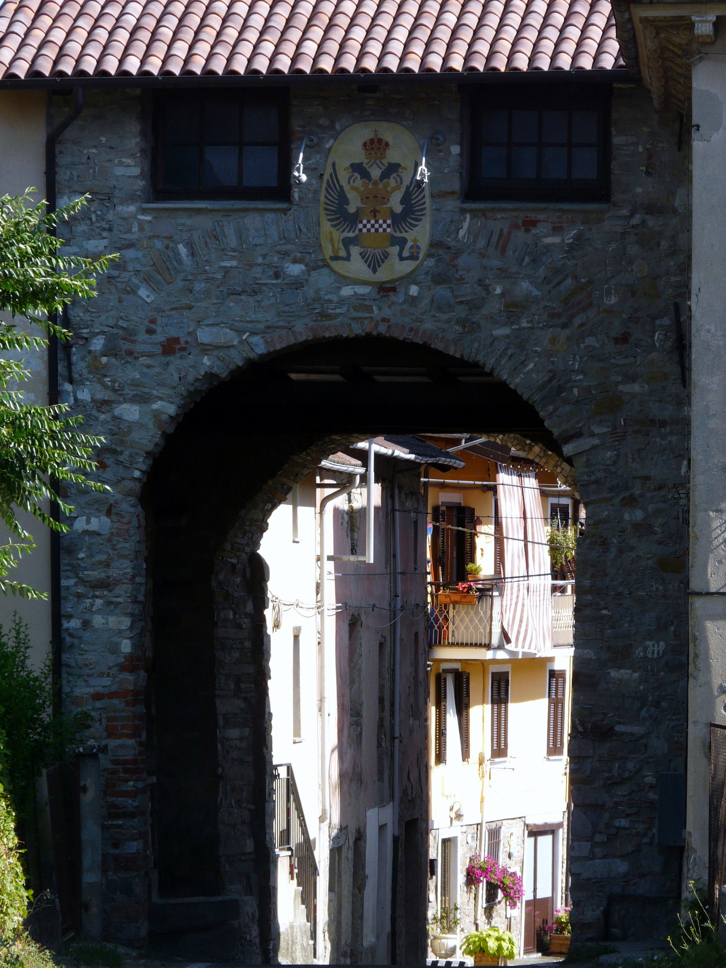 Antica porta d'accesso al borgo di Rocchetta Ligure, Piemonte, Italia